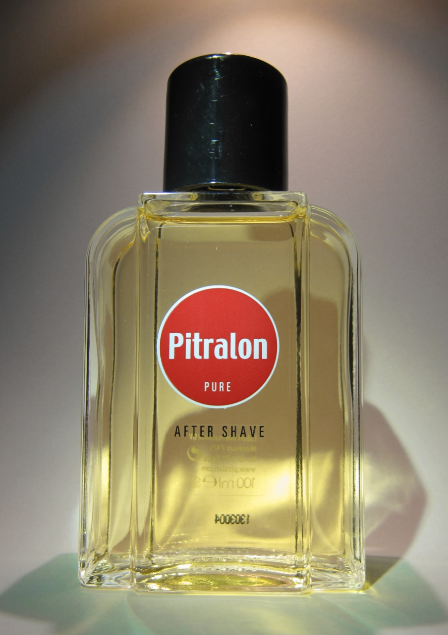 Pitralon Pure, Nederland, 2016